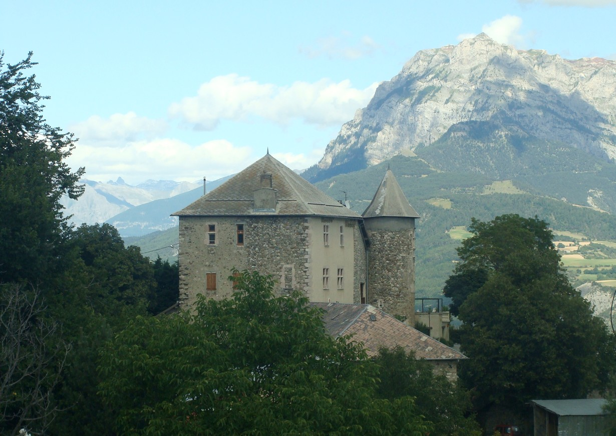 Le château de Rousset (Hautes-Alpes) et le sommet de Grand-Morgon.